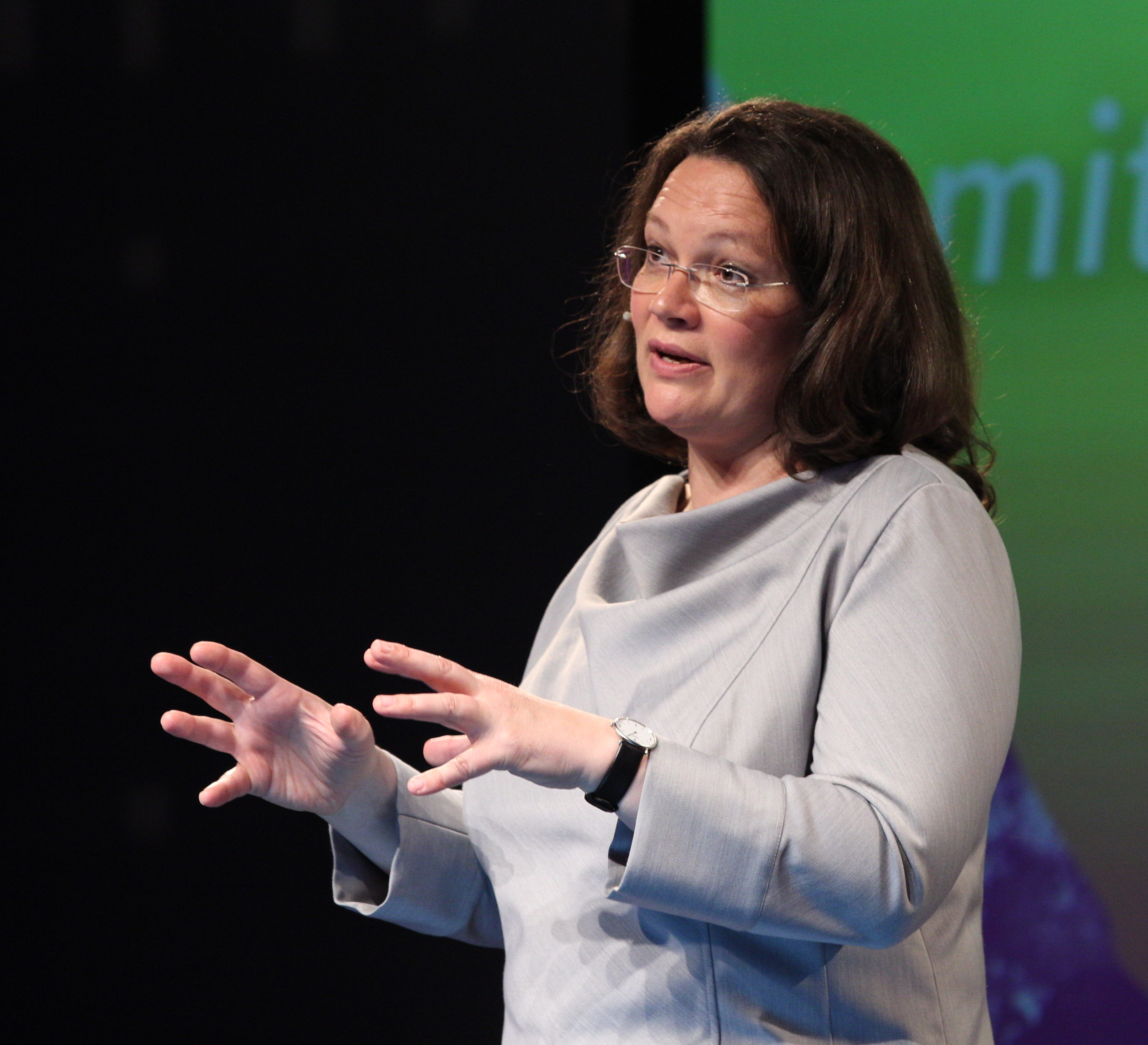 Andrea Nahles (Bundesministerin für Arbeit und Soziales) auf der re:publica 17